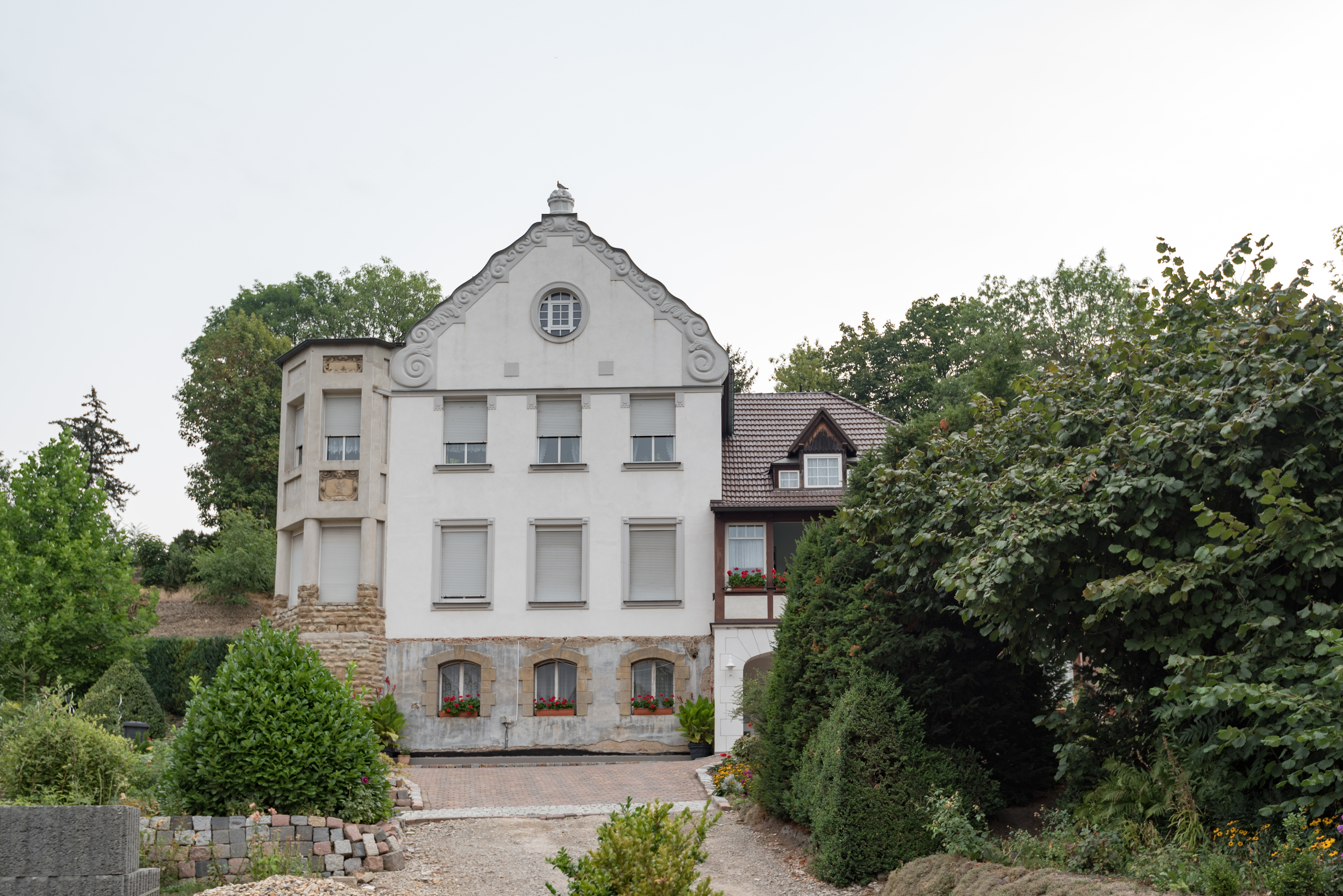 Weißenfels, Dr.-Benjamin-Halevi-Straße 2